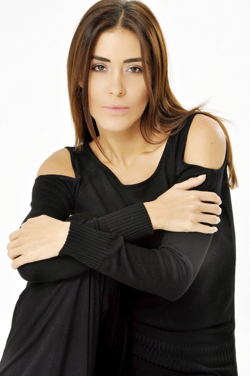 Sesión de fotos - 2015